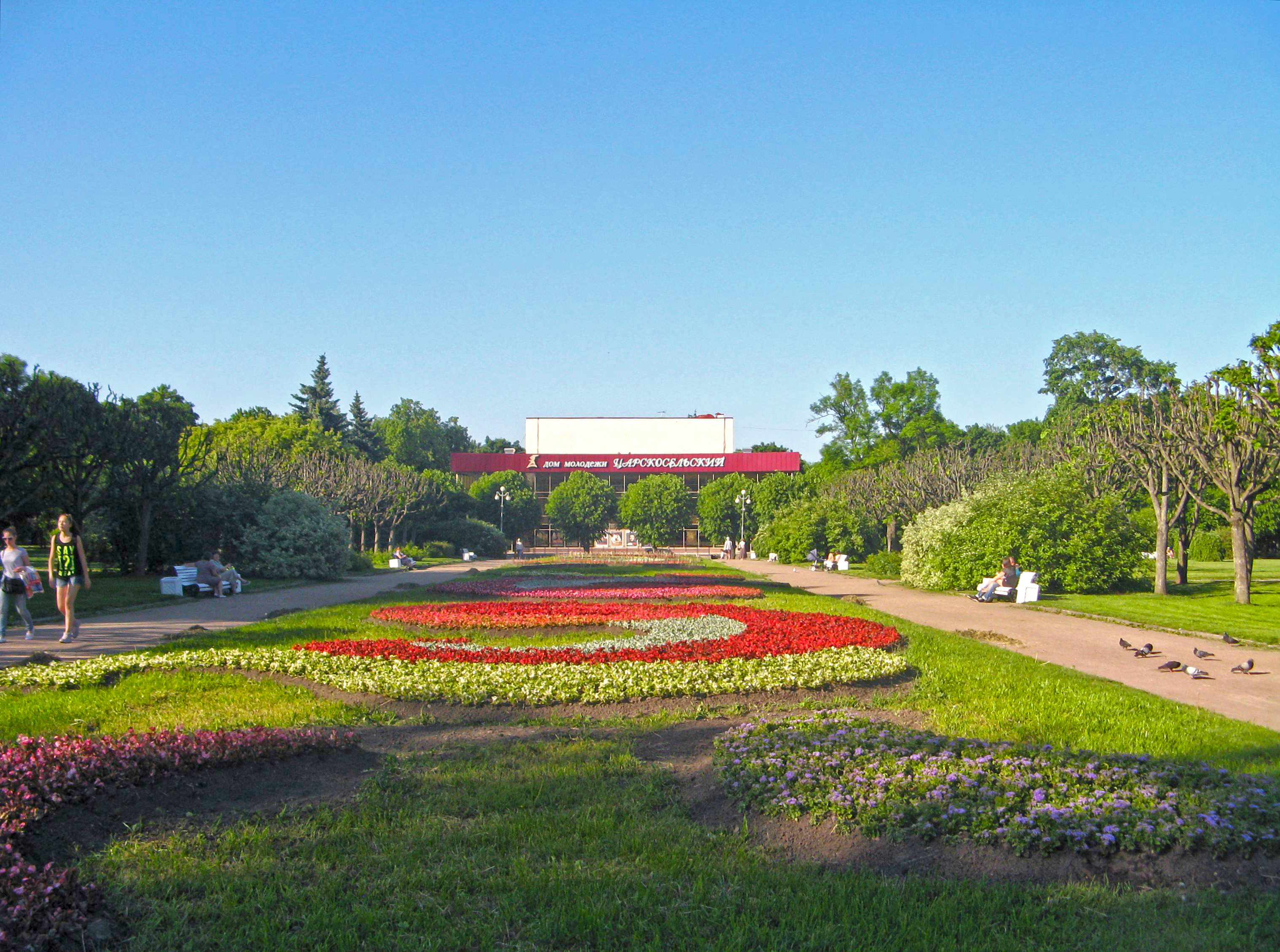 Пушкин, сквер перед Домом Молодежи